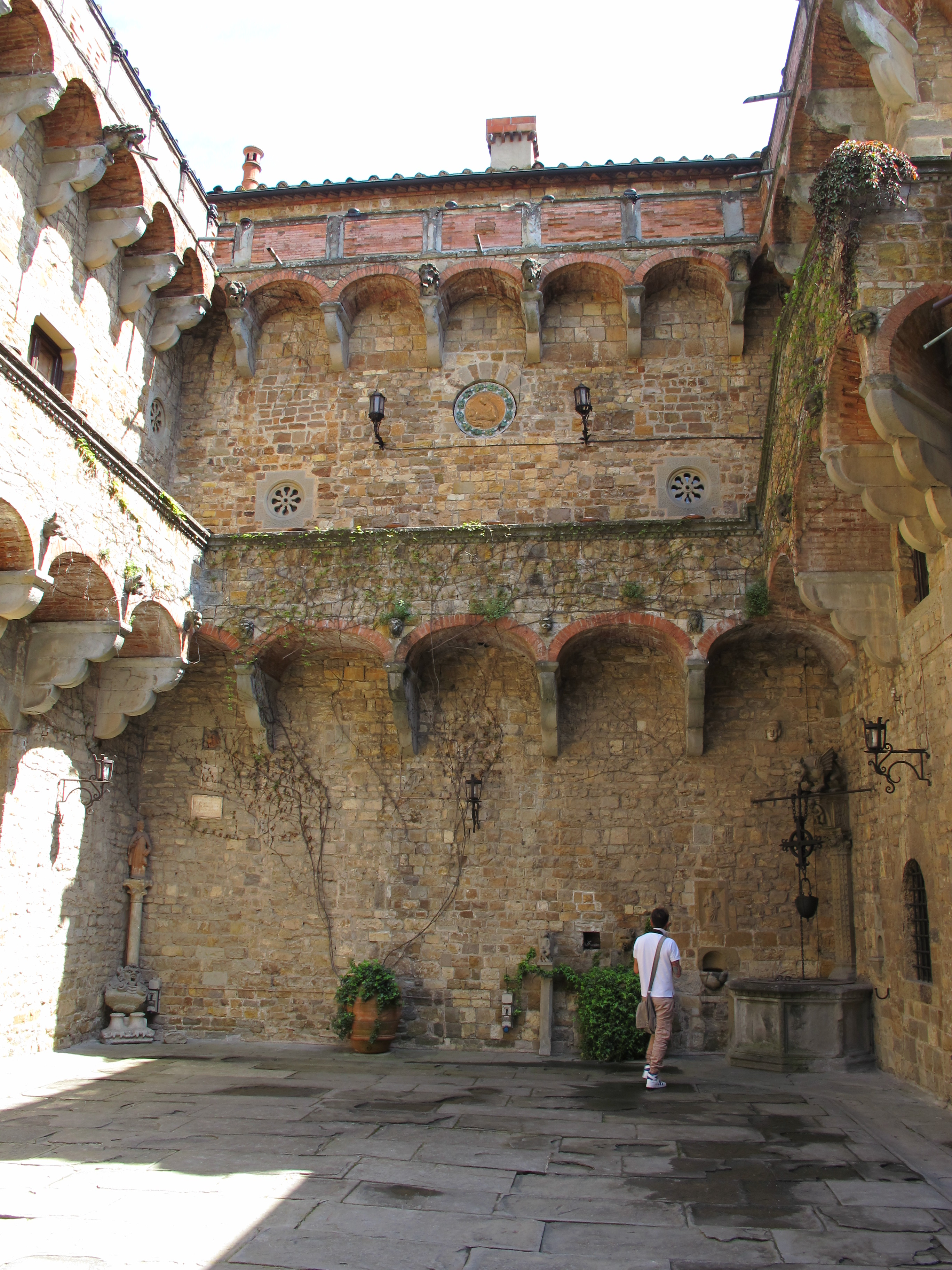 Castello di vincigliata, corte